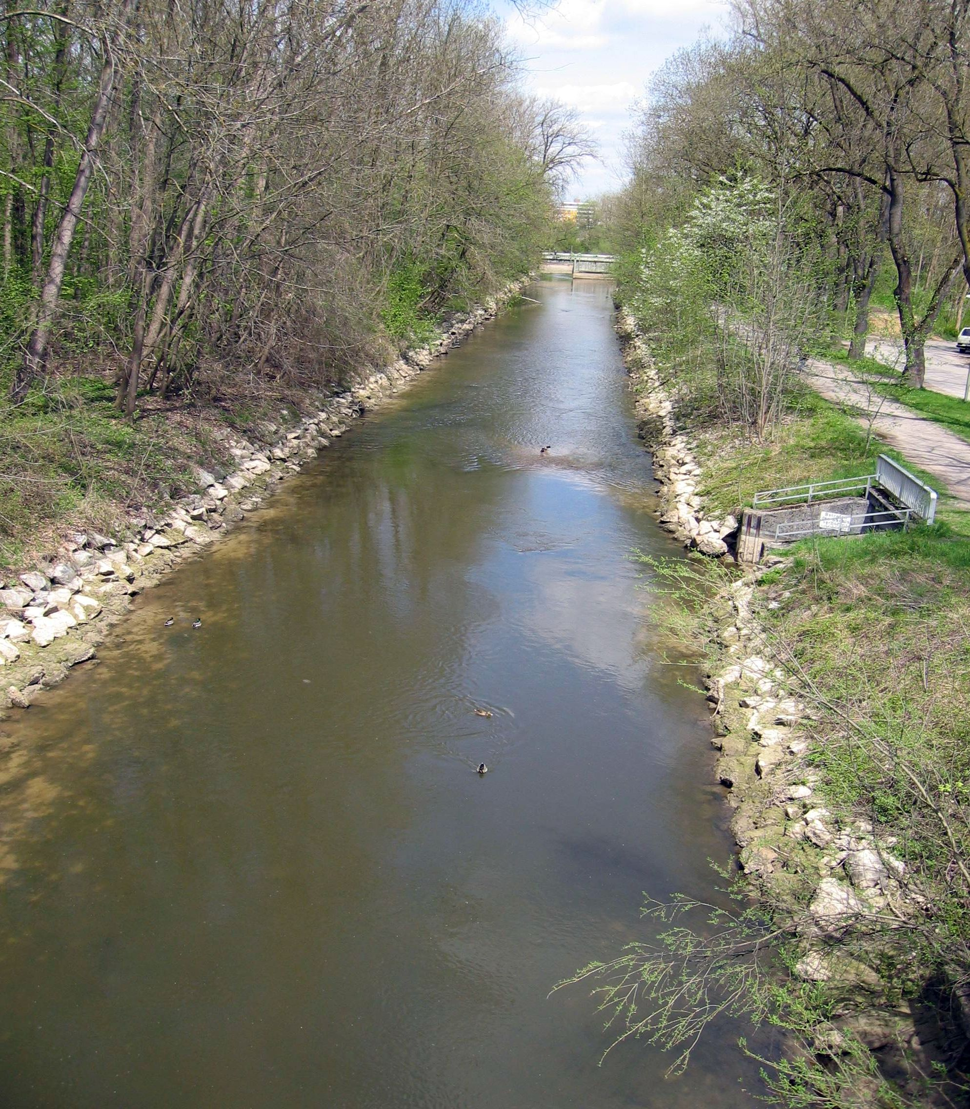 Zusehen ist der Fluss Singold